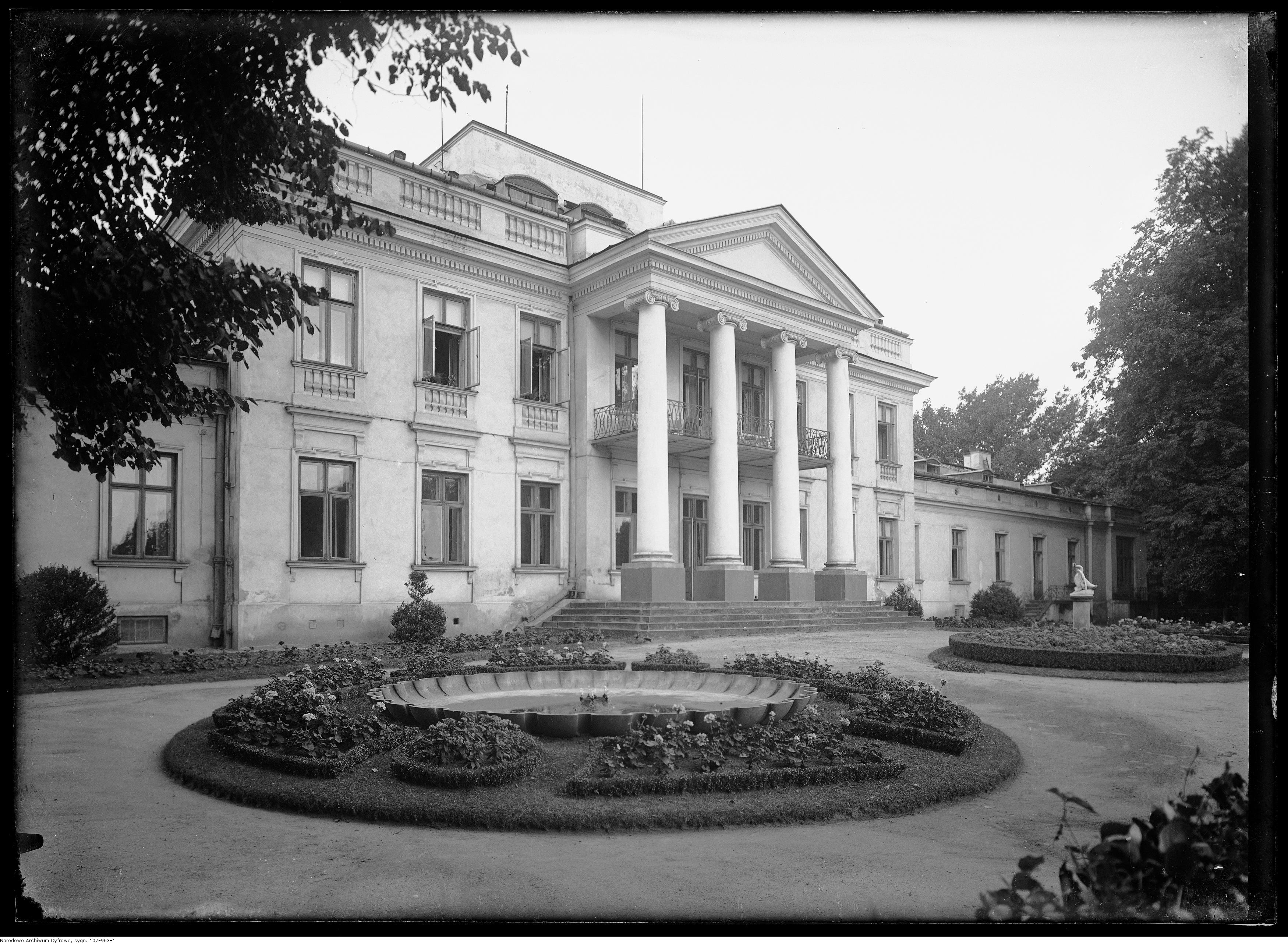 Elewacja frontowa od strony podjazdu.